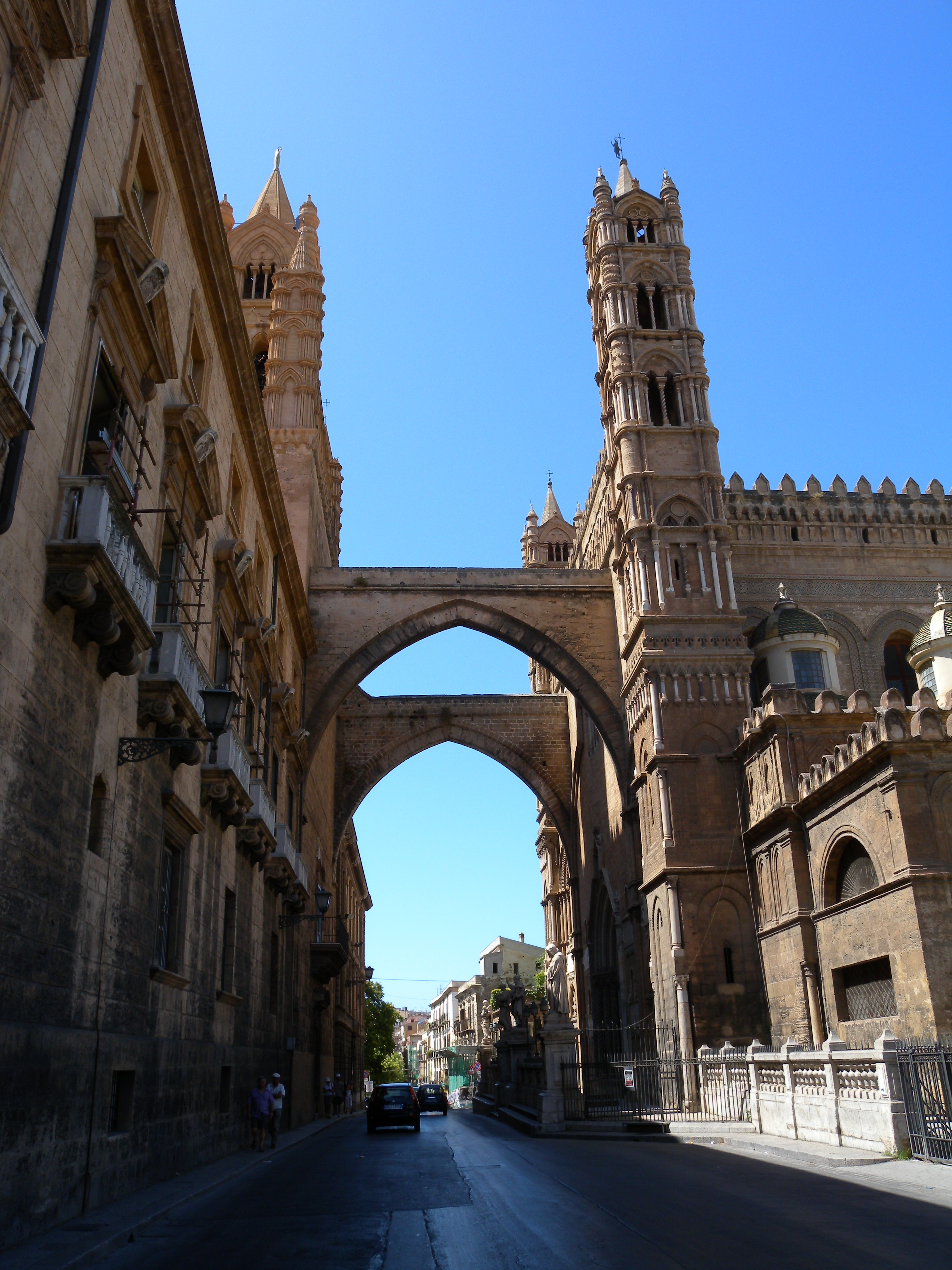 Palermo, Sicily